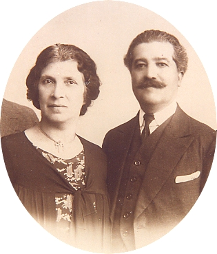 Alberto de Barcelos e Noronha e sua esposa Ambrosina Beatriz da Silveira Noronha